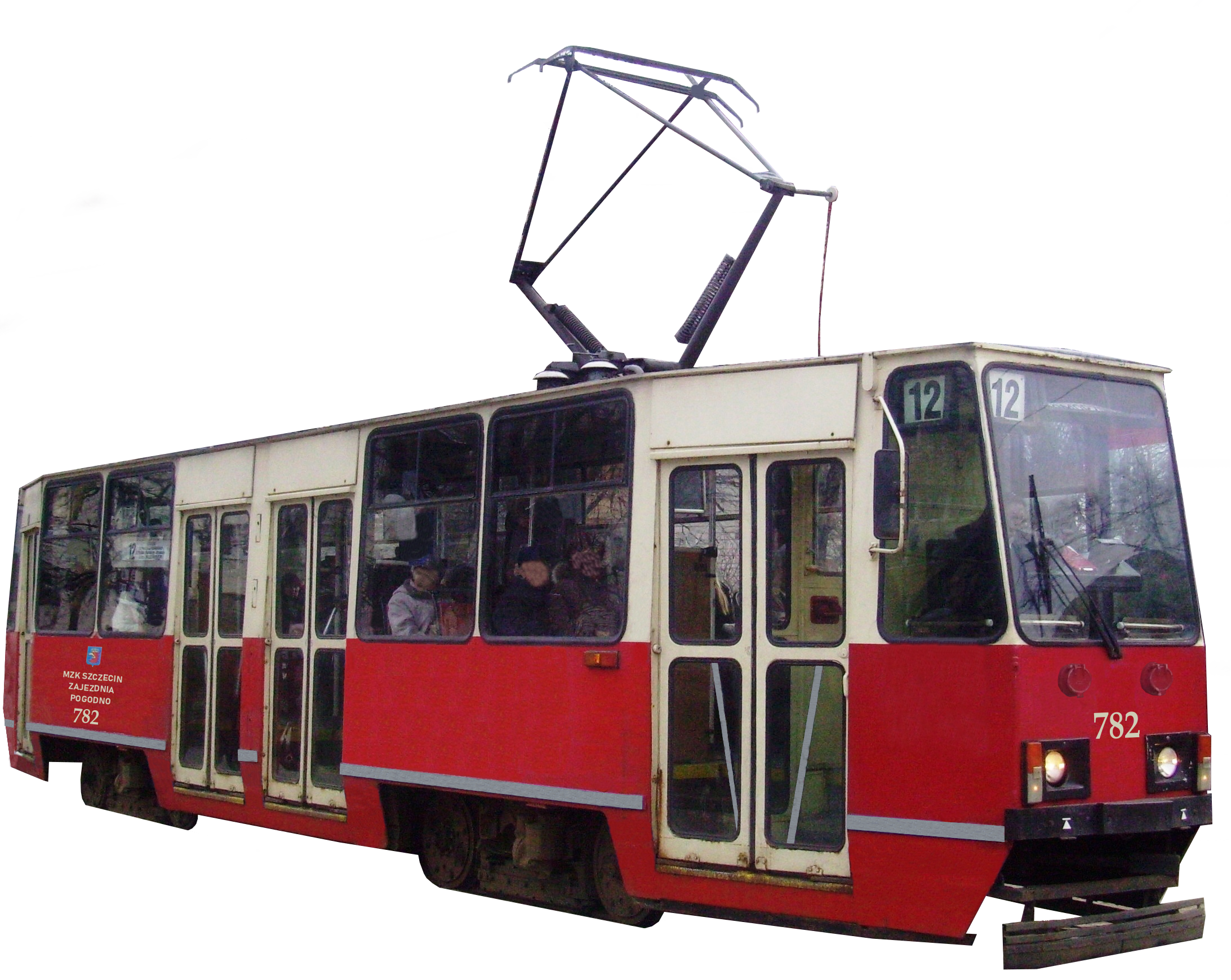 Rekonstrukcja wyglądu szczecińskiego tramwaju typu 106Na. Rekonstrukcję wykonano na podstawie zdjęć archiwalnych ze stron: oraz phototrans.eu. Wykorzystano zdjęcia: File:Konstal 105Na 732, tram line 12, Szczecin, 2011.jpg oraz File:Konstal 105Na 1015, tram line 11, Szczecin, 2009.jpg autorstwa user:Szczecinolog.